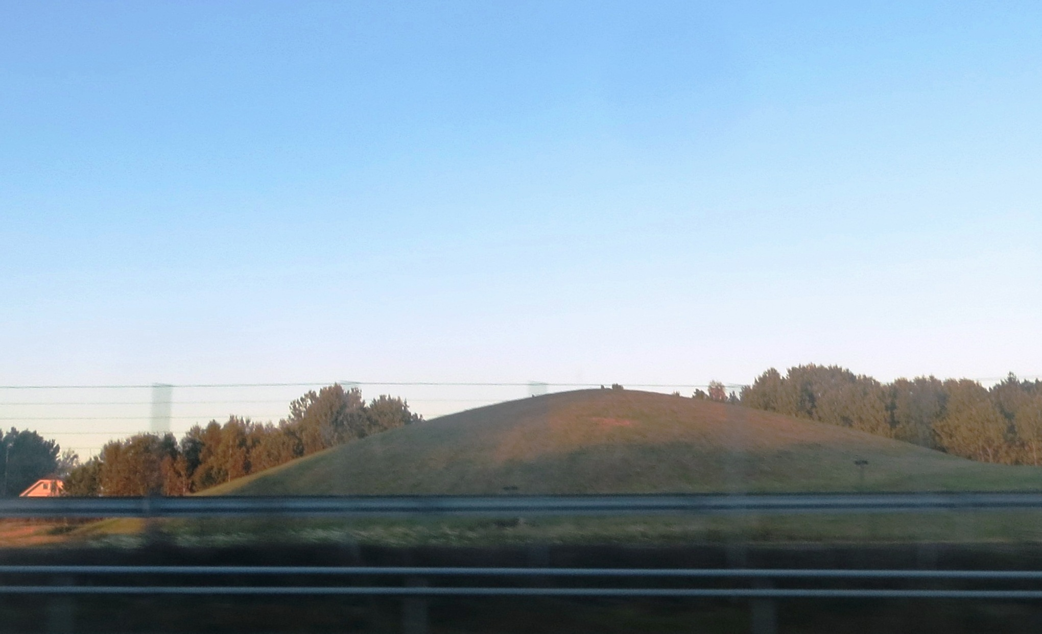 Jellhaugen i Halden kommun, Østfold